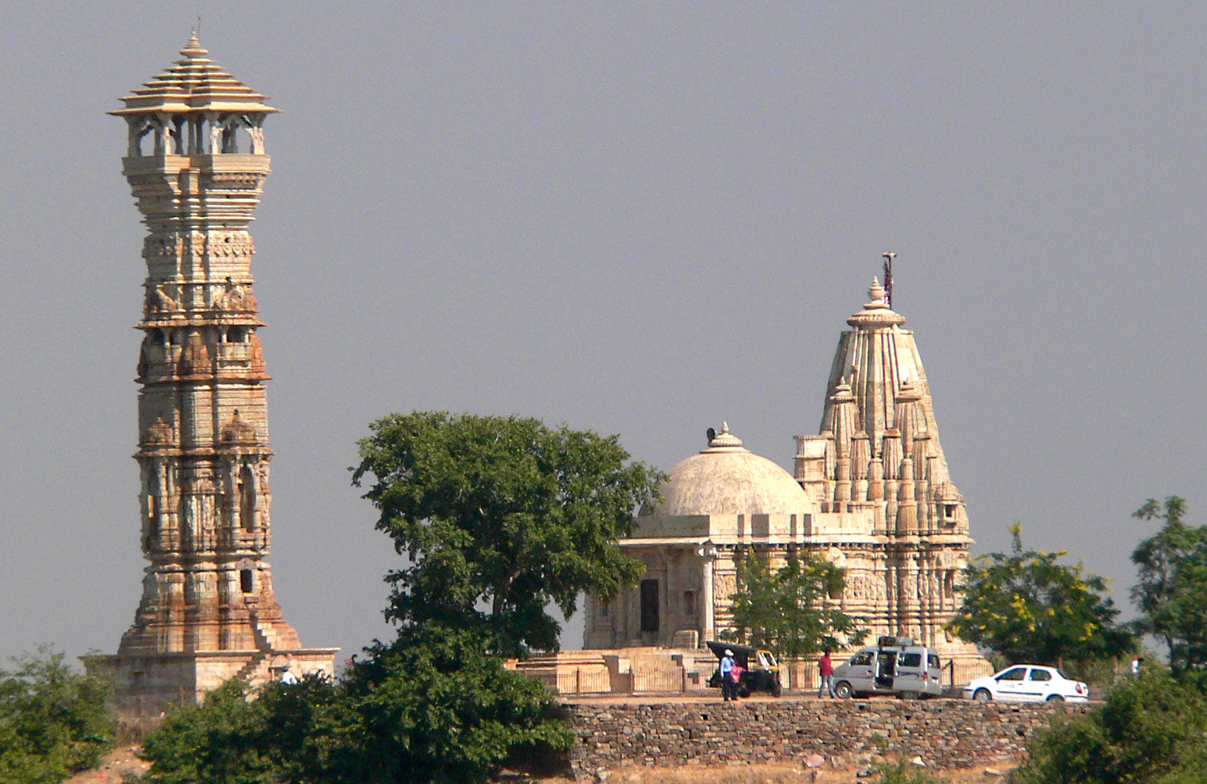 Kriti Stambh,Chittorgarh